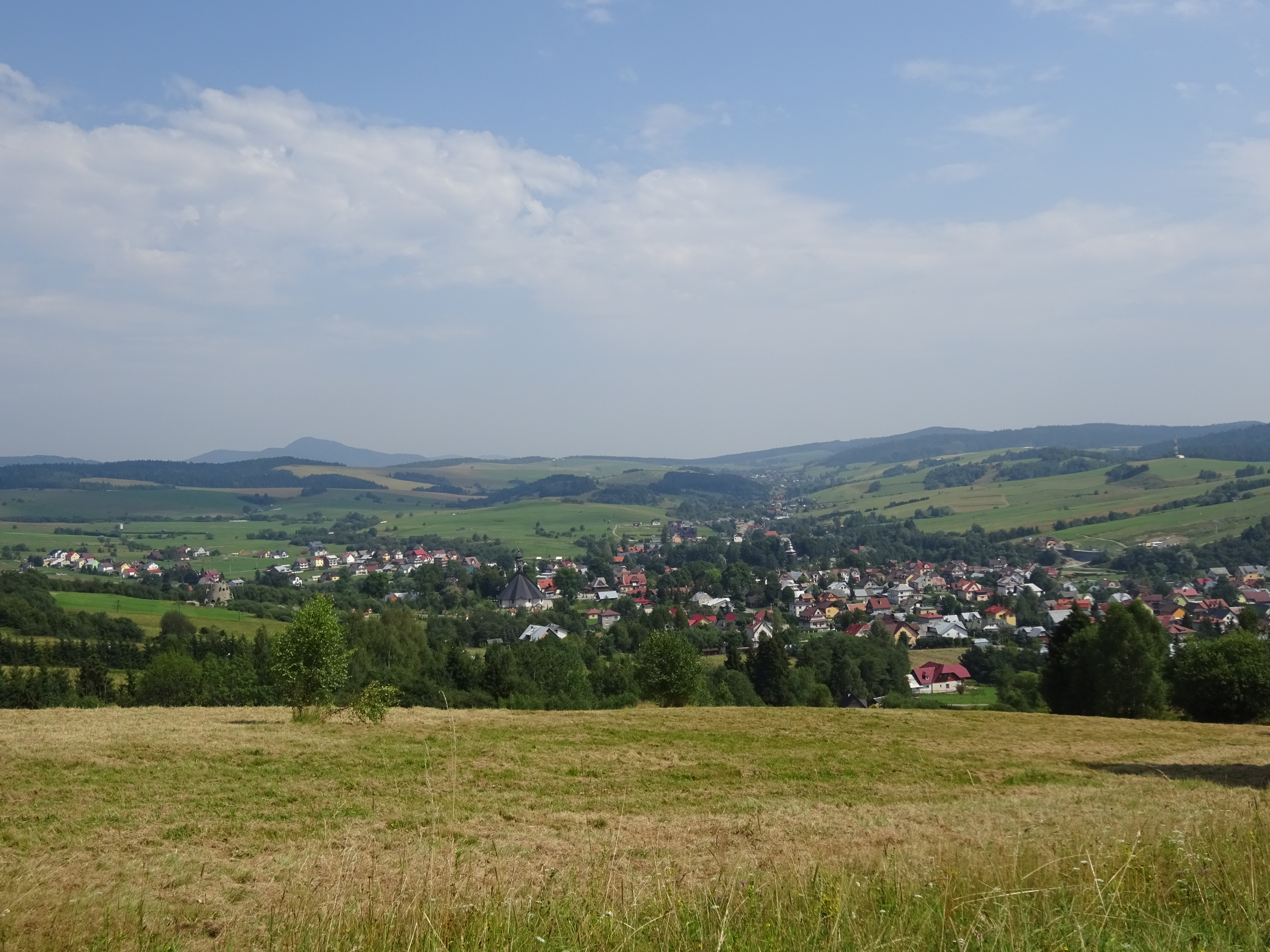 Widok z południowych stoków Szwarcowej na Tylicz. Beskid Sądecki, Pasmo Jaworzyny. 2017